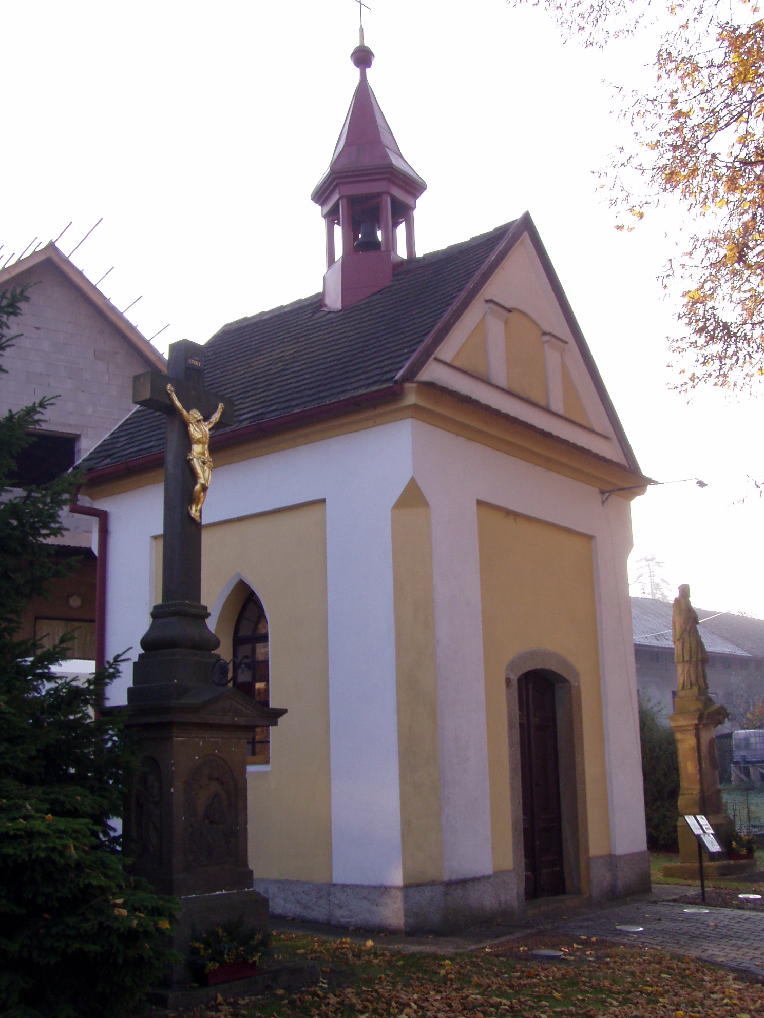 Kaple sv. Jana Nepomuckého (Domašín)